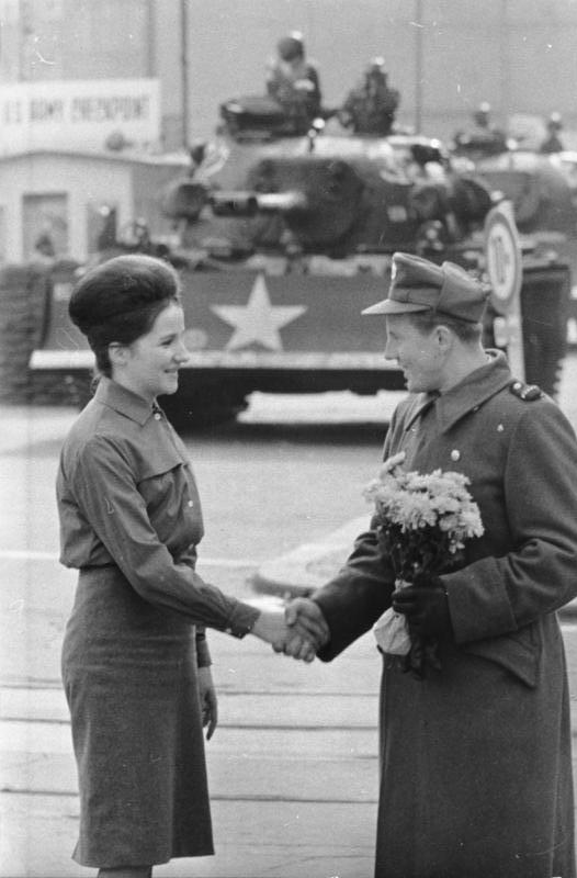 ADN-ZB/Archiv, 30.10.1961 Durchführung der Grenzsicherungsmaßnahmen vom 13.8.1961 in Berlin Friedrichstr.. Berliner Bürger danken den Angehörigen der Volkspolizei für ihre Besonnenheit während der Provokation der US-Ultras. Im Hintergrund amerikanische Panzer aus dem Territorium von Westberlin.